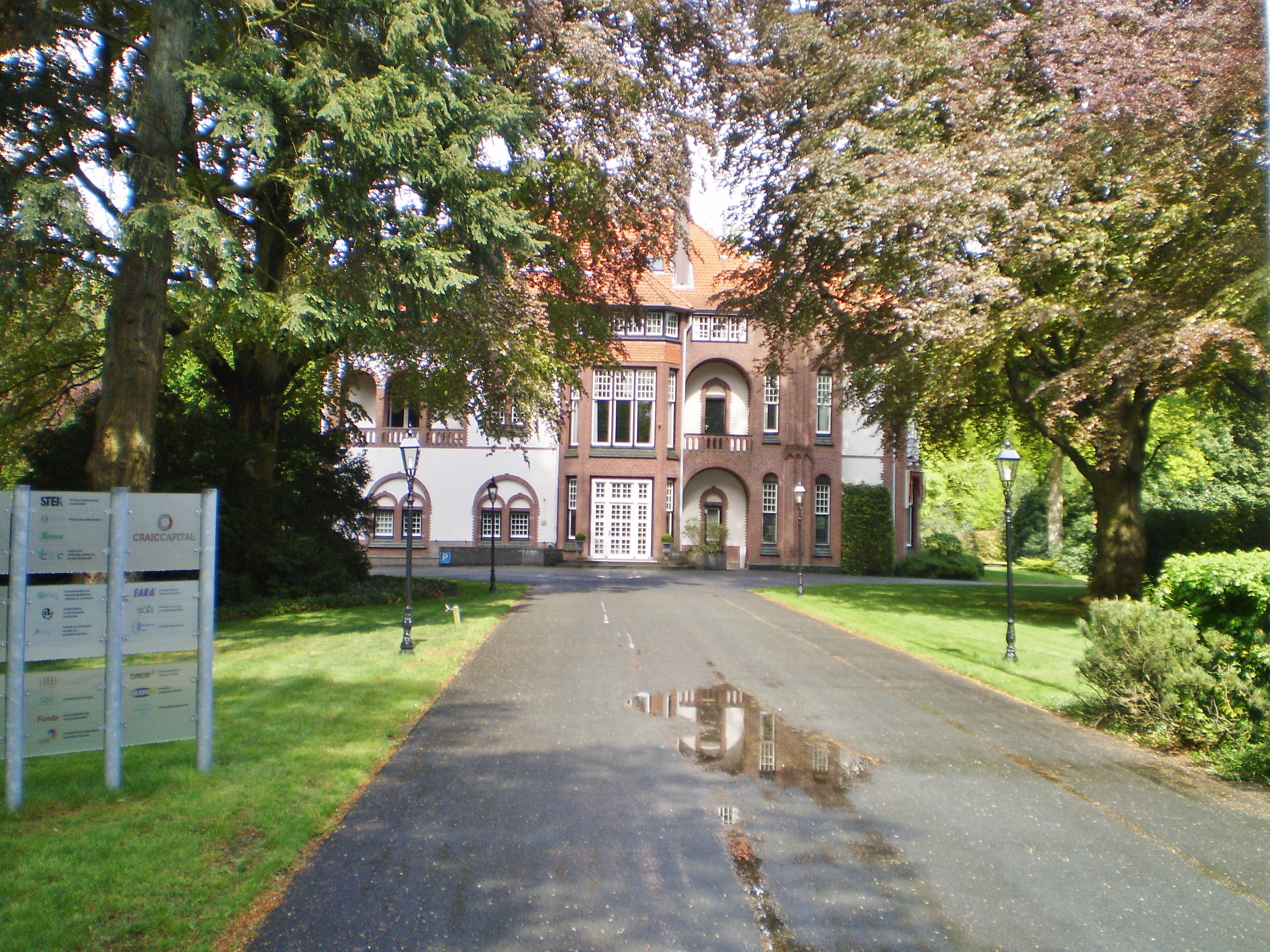 Parkwijk staat al enige tijd te koop en is de duurste villa van Baarn